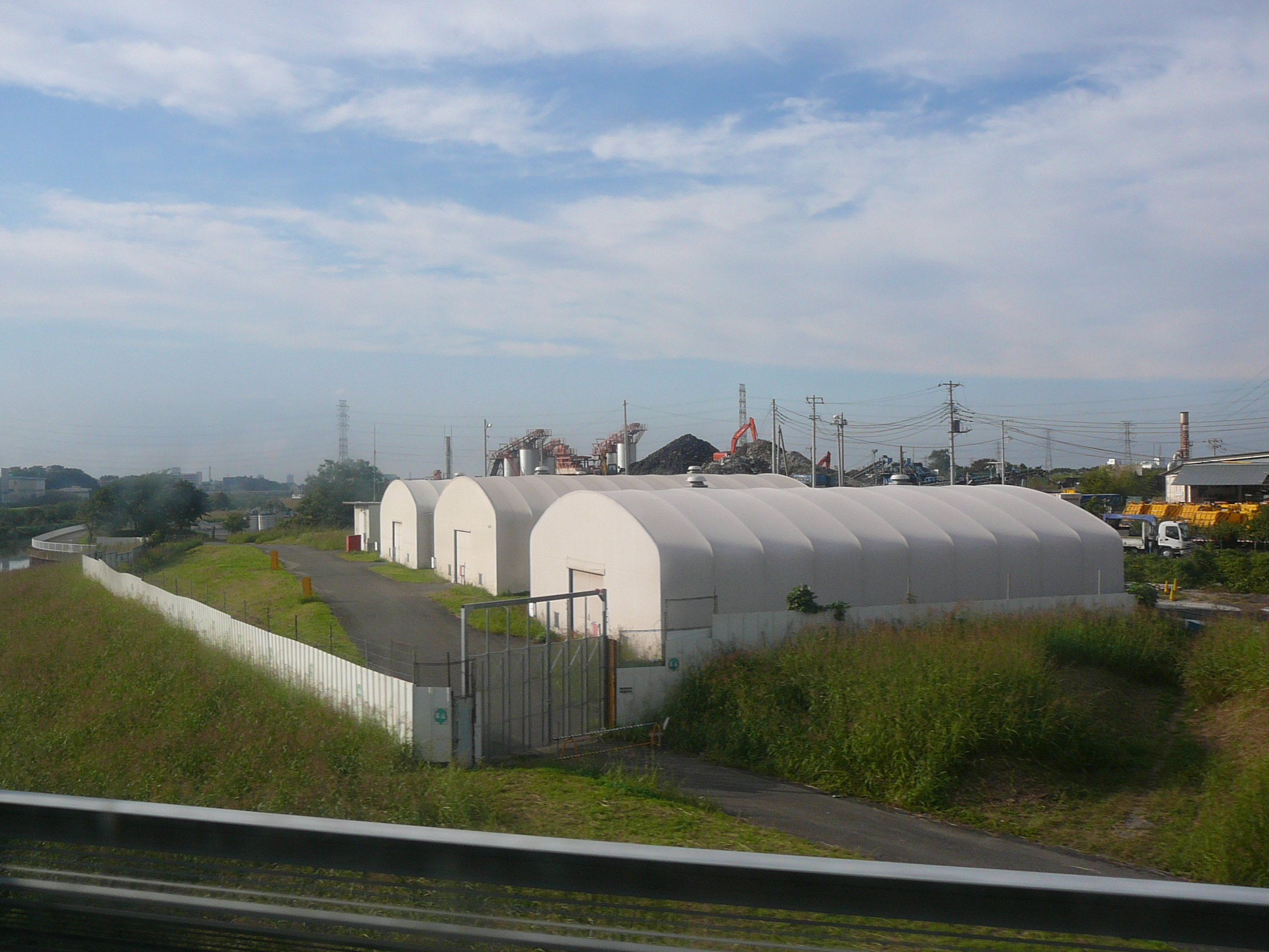 掘削した廃棄物及び汚染土壌はドラム缶950本に収納し仮置きテント内に保管(2011/10/23撮影)